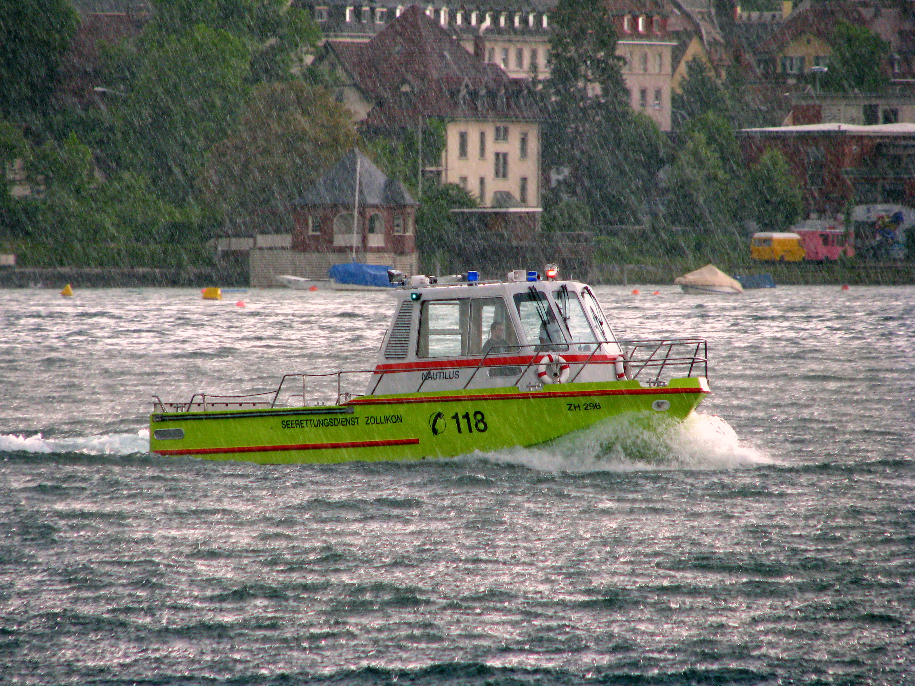 Search and Rescue boat of Seerettungsdienst Zollikon (Switzerland), as seen on Lake Zürich